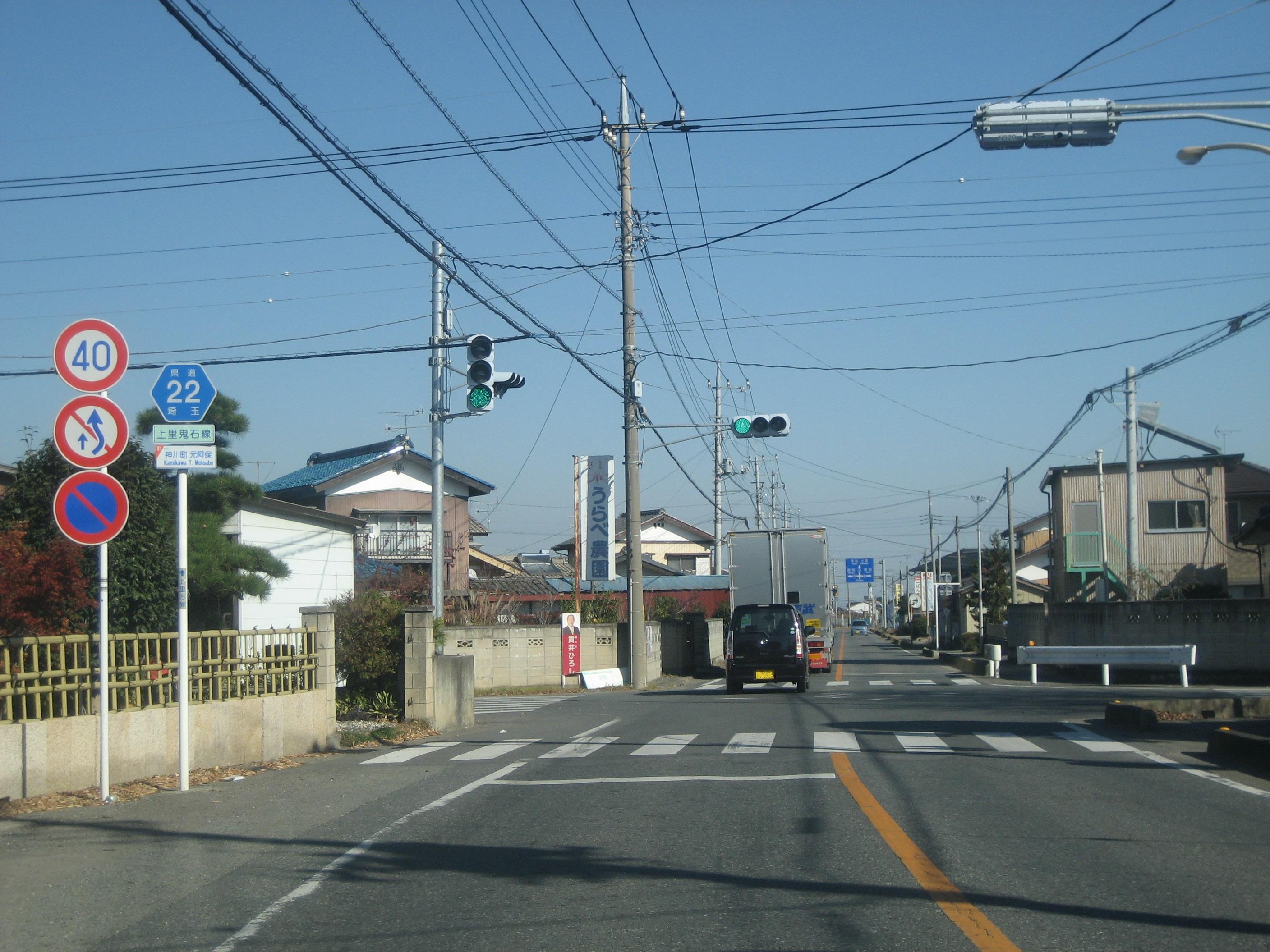 埼玉県道22号線神川町内